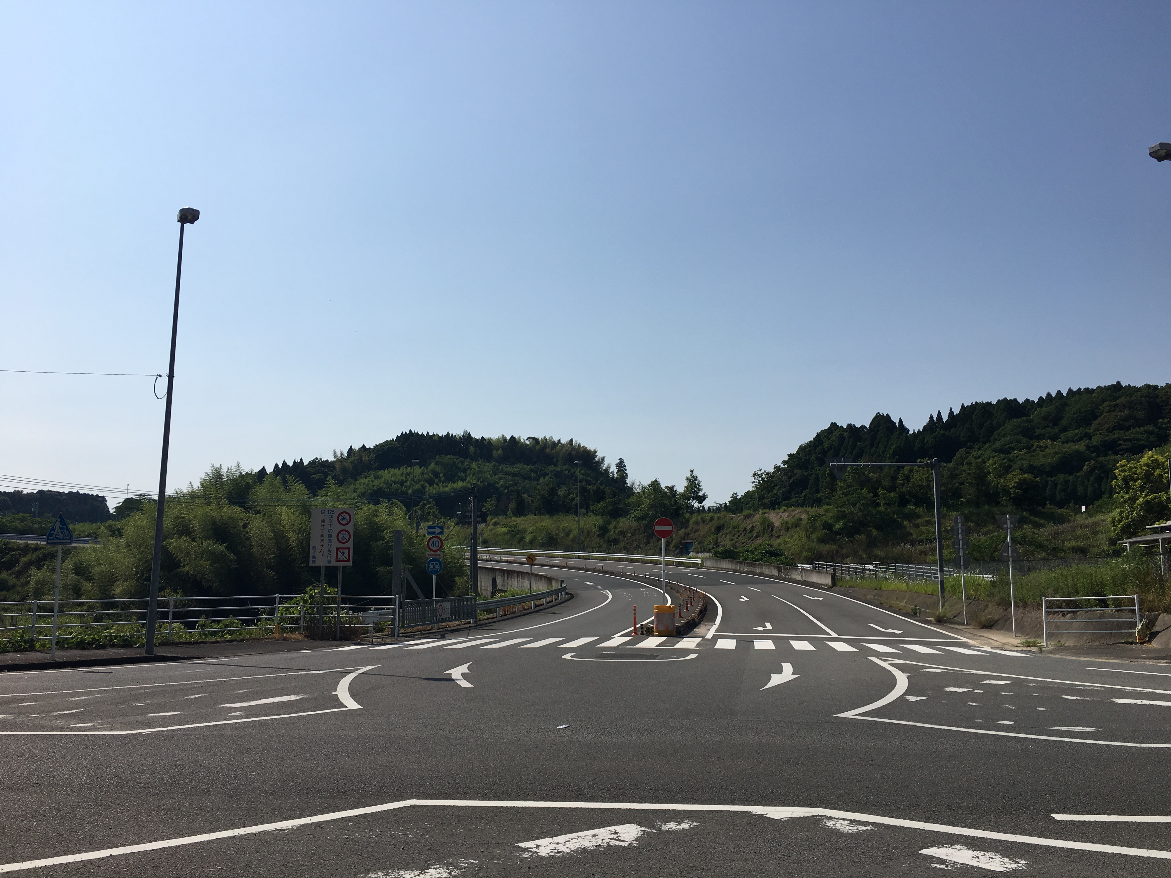 松山インターチェンジの出入口